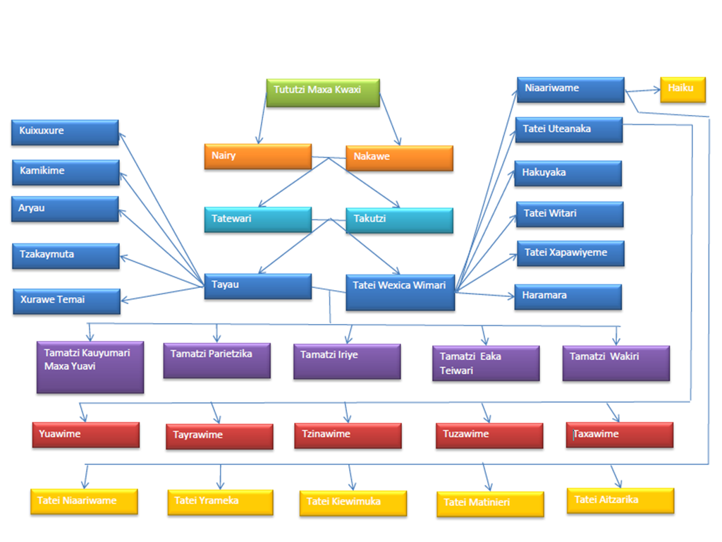 Árbol genealógico de los dioses huicholes.